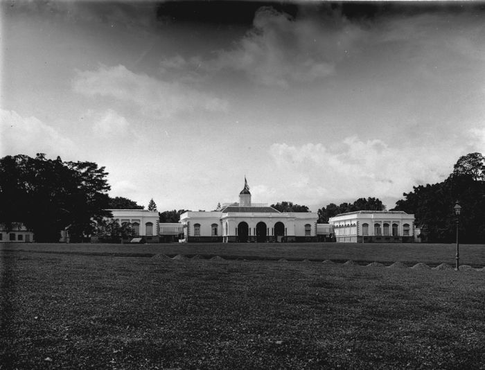 Foto. Paleis van de Gouverneur-Generaal in 's Lands Plantentuin te Buitenzorg.